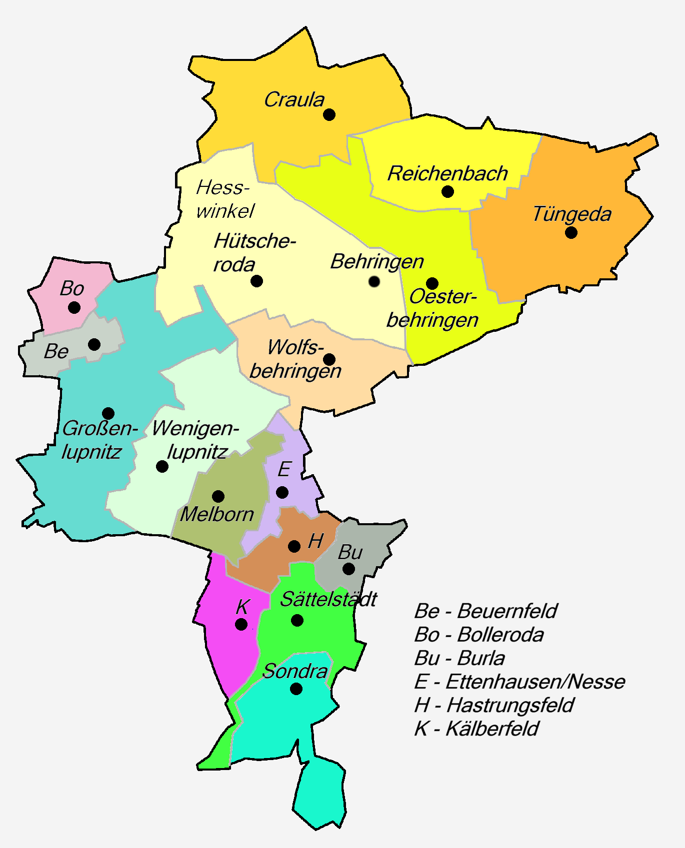 Ausgangslage 1949